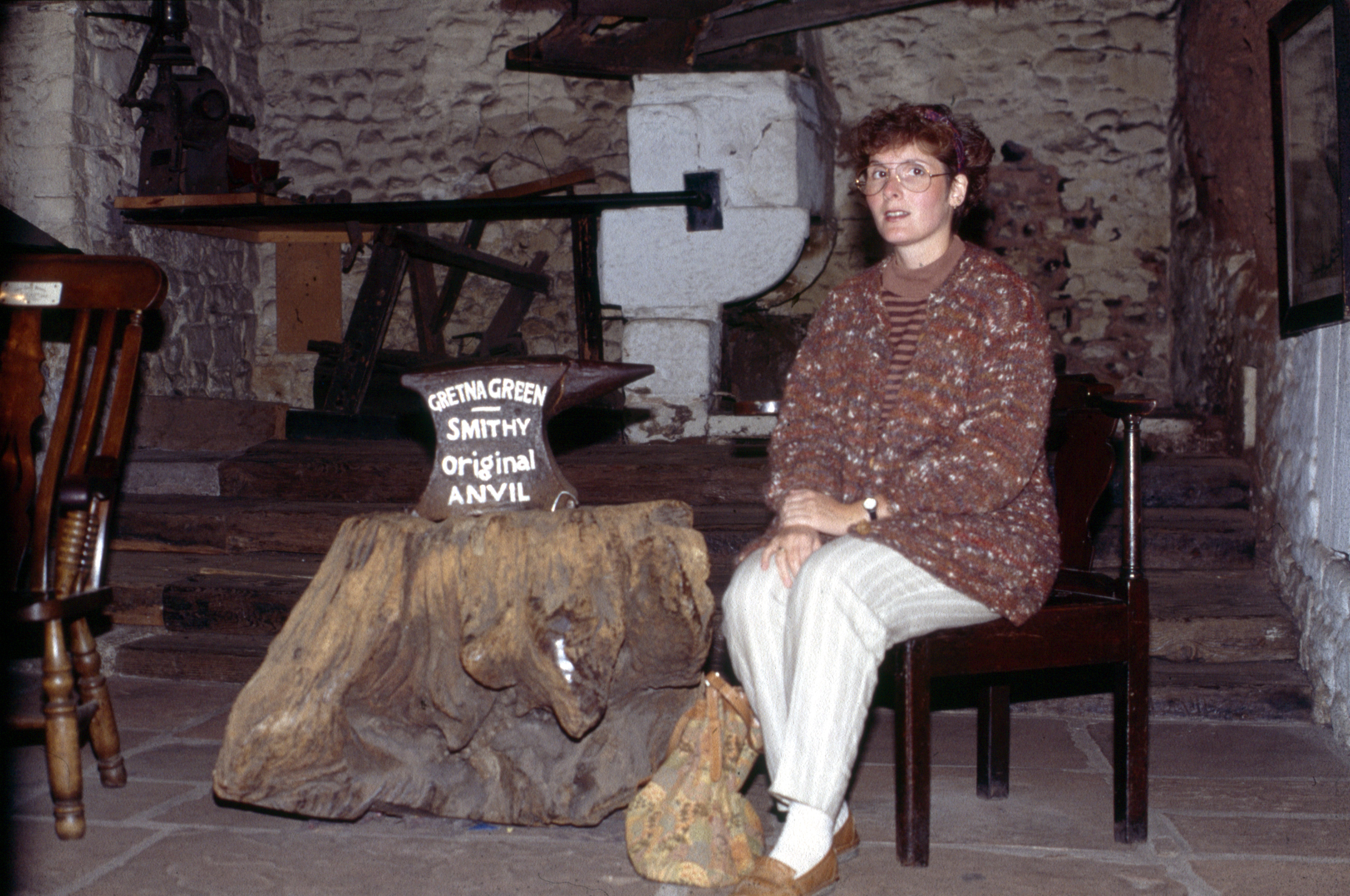 Old Blacksmith's Shop, Gretna Green